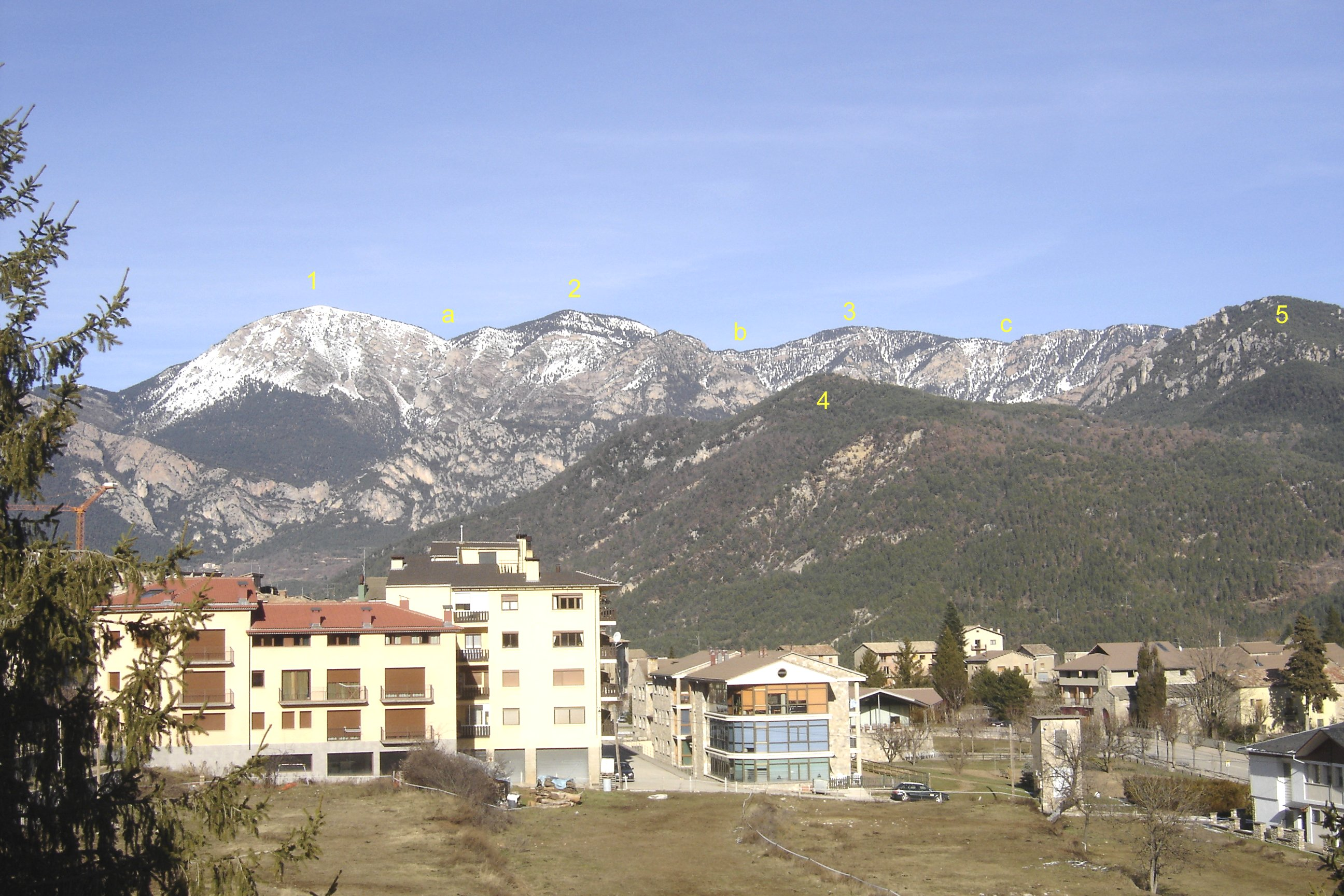 La Serra del Verd des de Sant Llorenç de Morunys (Solsonès) 1 - Cap del Verd2 - Cap de Prat d'Aubes3 - Cap d'Urdet4 - El Jou5 - Serra de Pratformiua - Coll dels Belitresb - Tres Colletsc - Coll de Pradell.